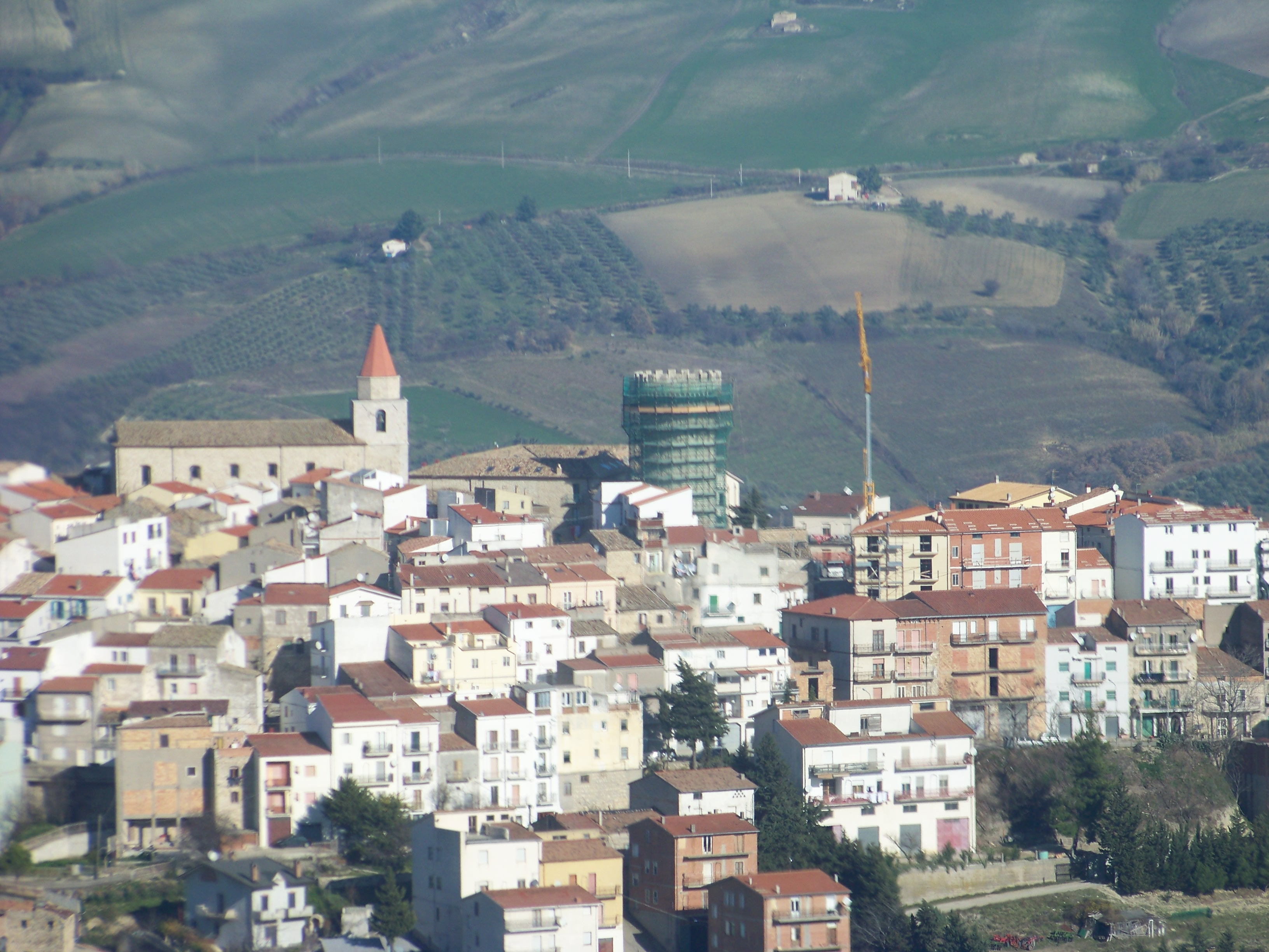 Vista panoramica di Colletorto